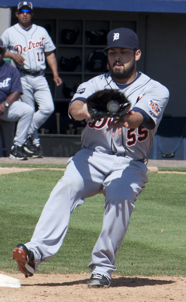 Daniel Schlereth